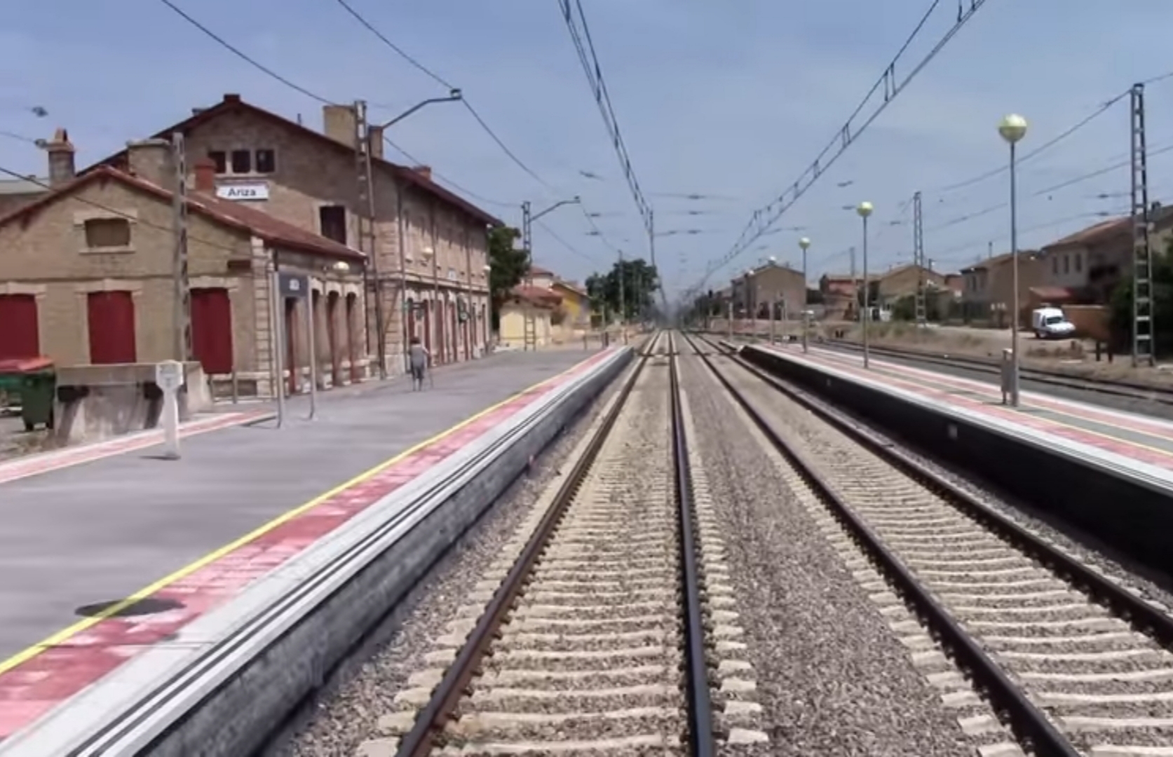 Estación de Ariza vista desde la cámara trasera de un tren Regional R-470. Vía 1.